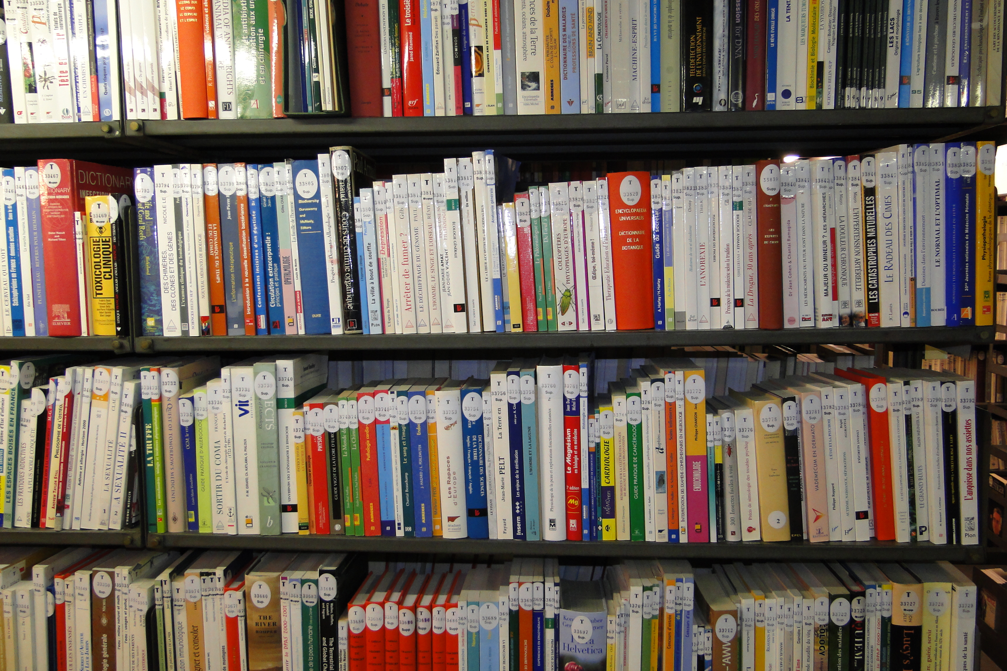 Magasins du Dépôt, collections contemporaines, lettre T (sciences appliquées)